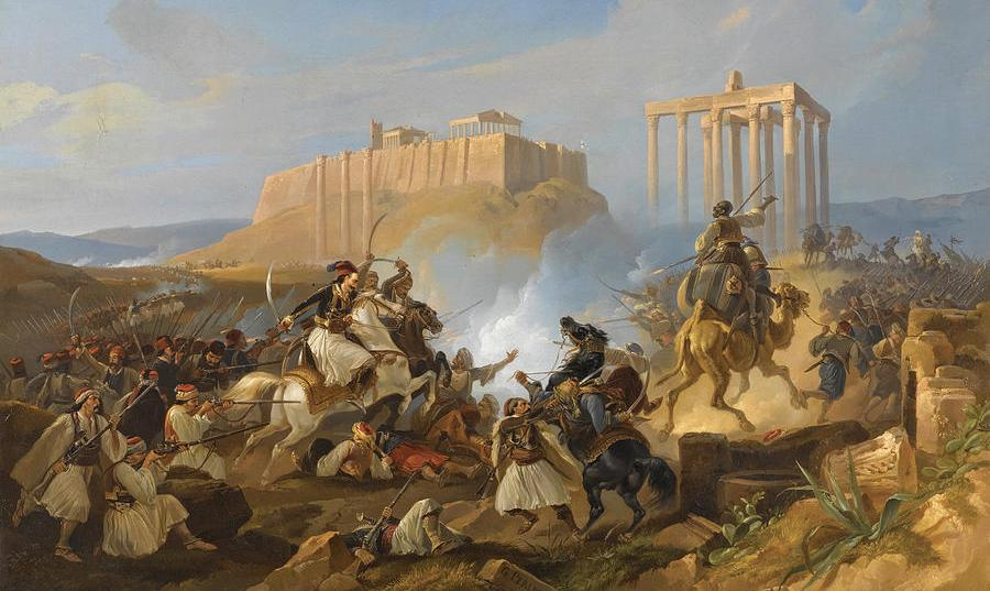 Scène de bataille - Siège de l'Acropoles, pendant la Guerre d'indépendance grecque, par le peintre allemand Georg Perlberg (1807-1884)